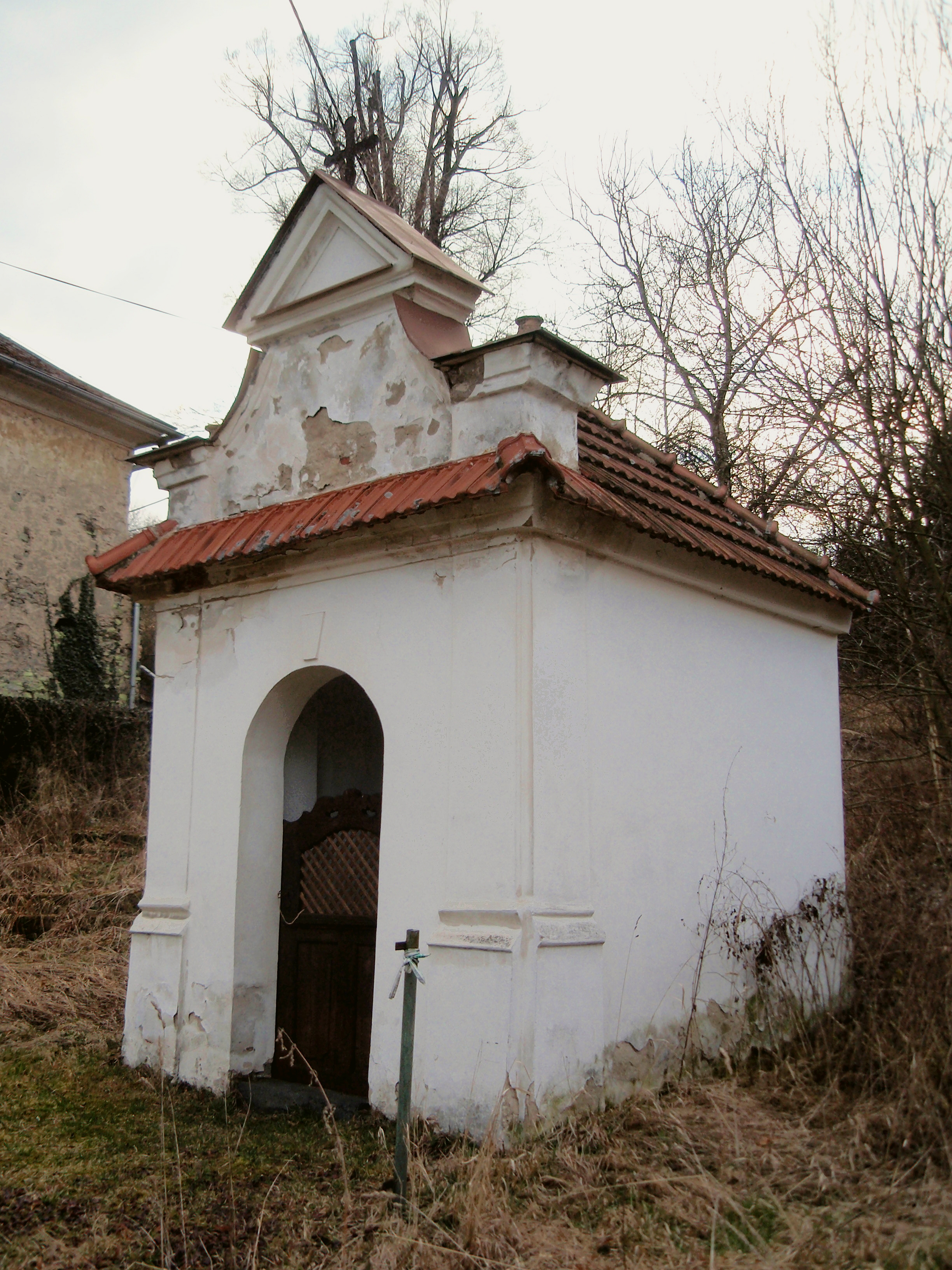 Jediná zachovaná sakrální stavba současných Valkeřic. Pozdně barokní kaple z roku 1792.